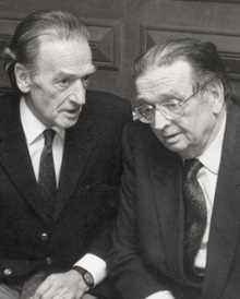 Emmanuel d'Hooghvorst (à droite) accompagné de son frère Charles (à gauche)